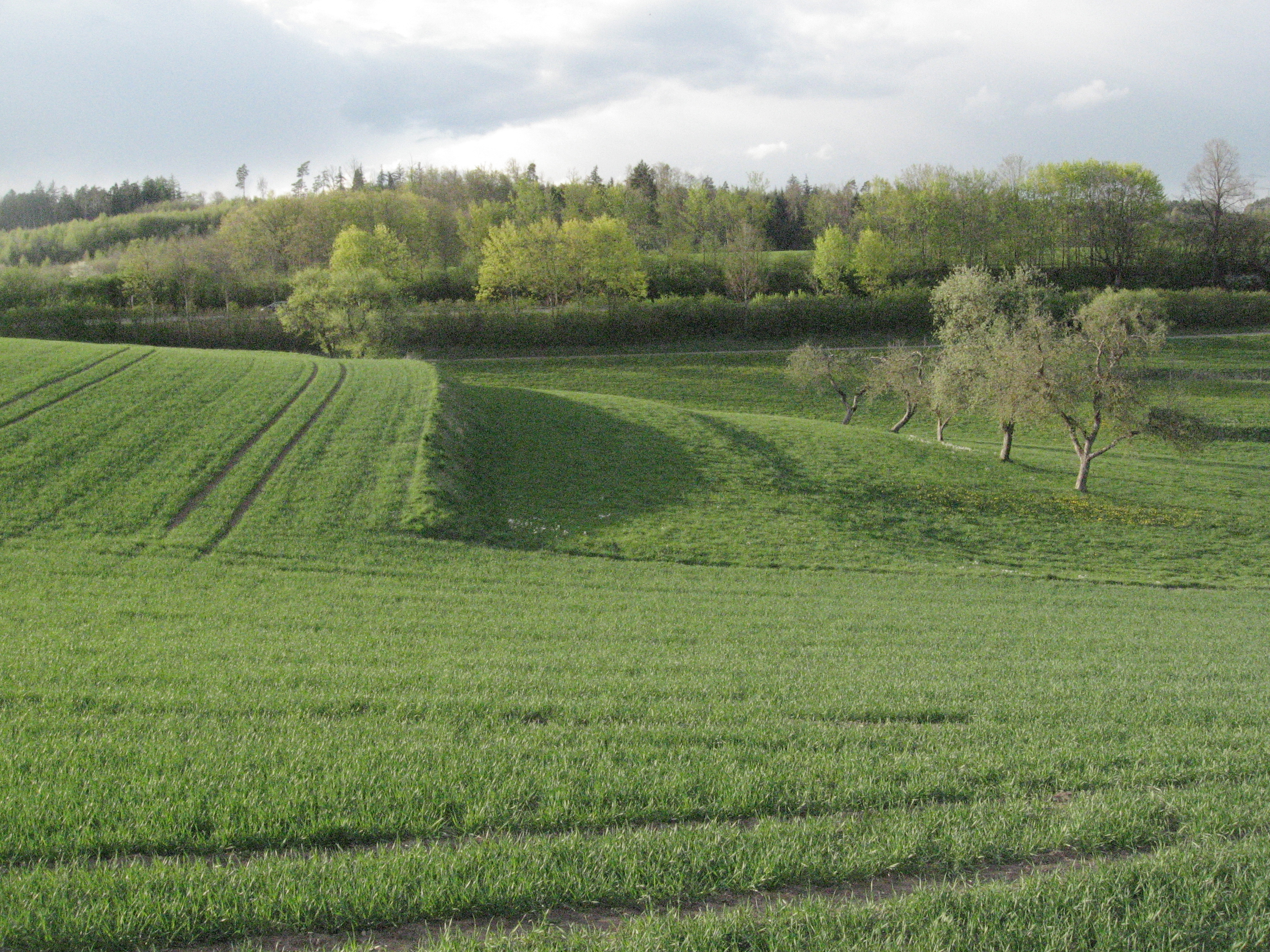 Terrasse am Ostrand der Markertshofener beackerten Feldgemarkung Ebene, einer Verebnungsfläche über der Corbula-Bank des Gipskeupers. Östlich-unterhalb Markertshofen zu schließen sich bis ins Tal nur noch Wiesen an.